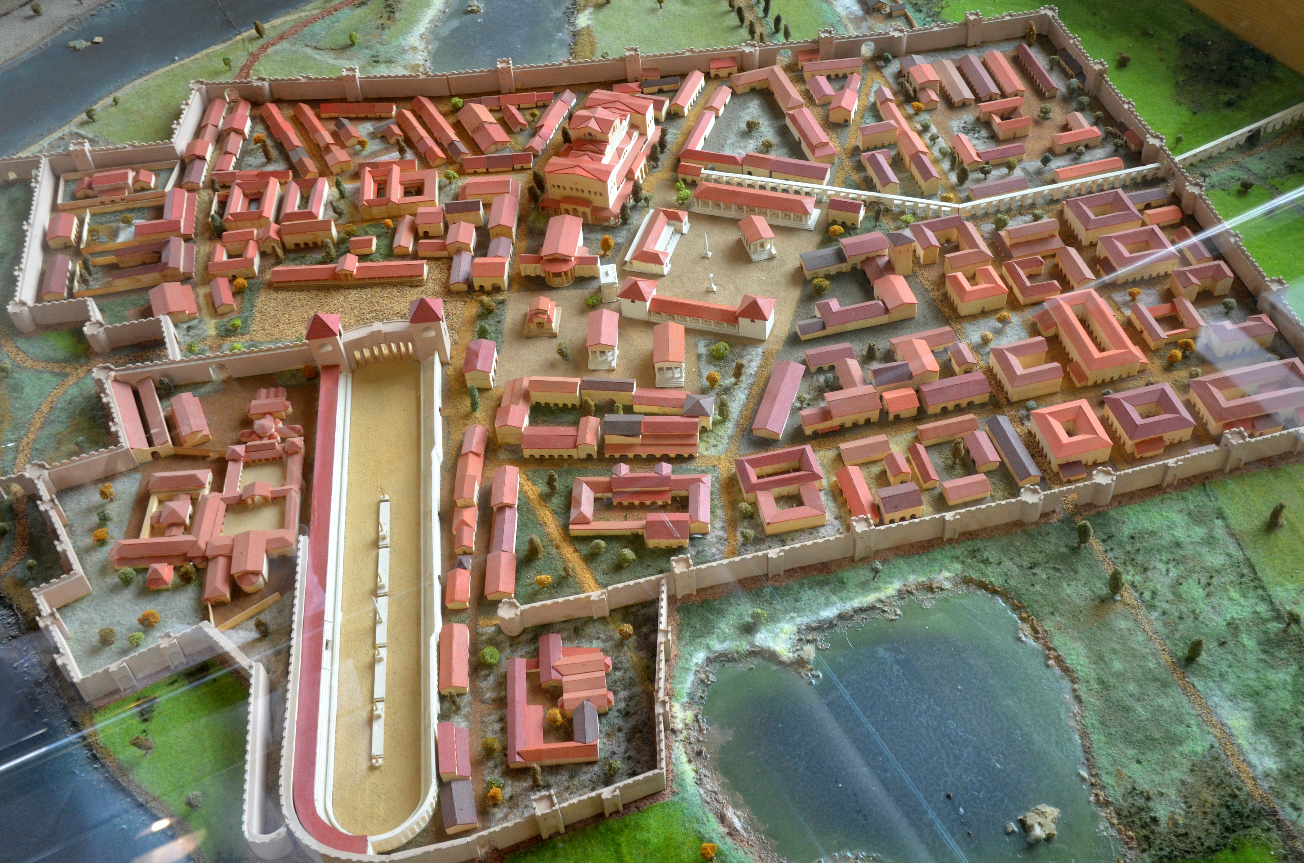 Sirmium, Pannonia Inferior, Serbia